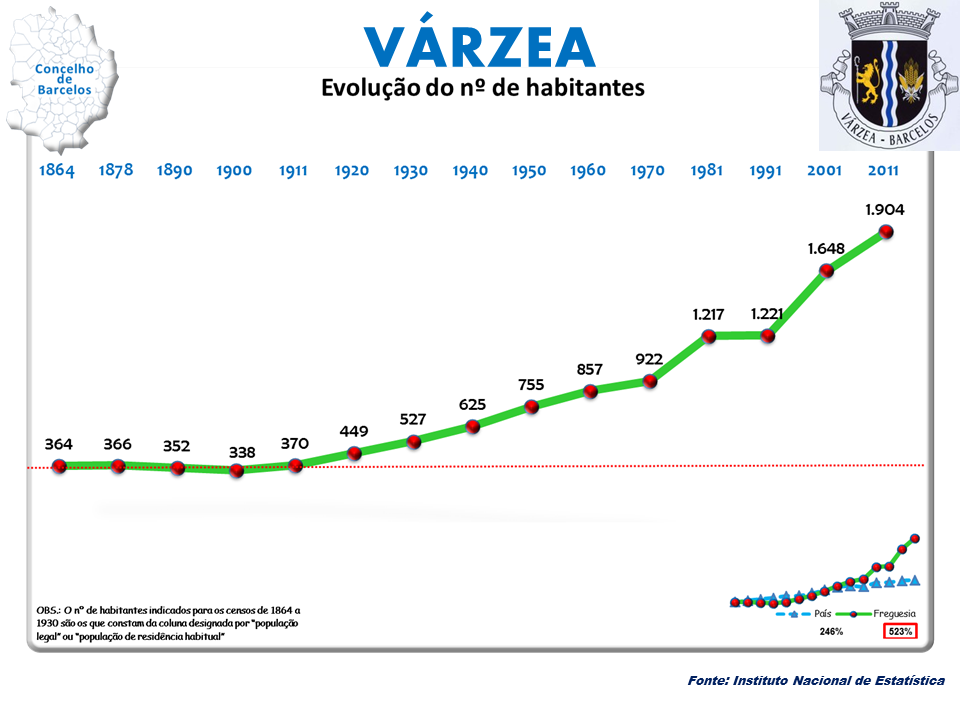 Censos 1864/2011